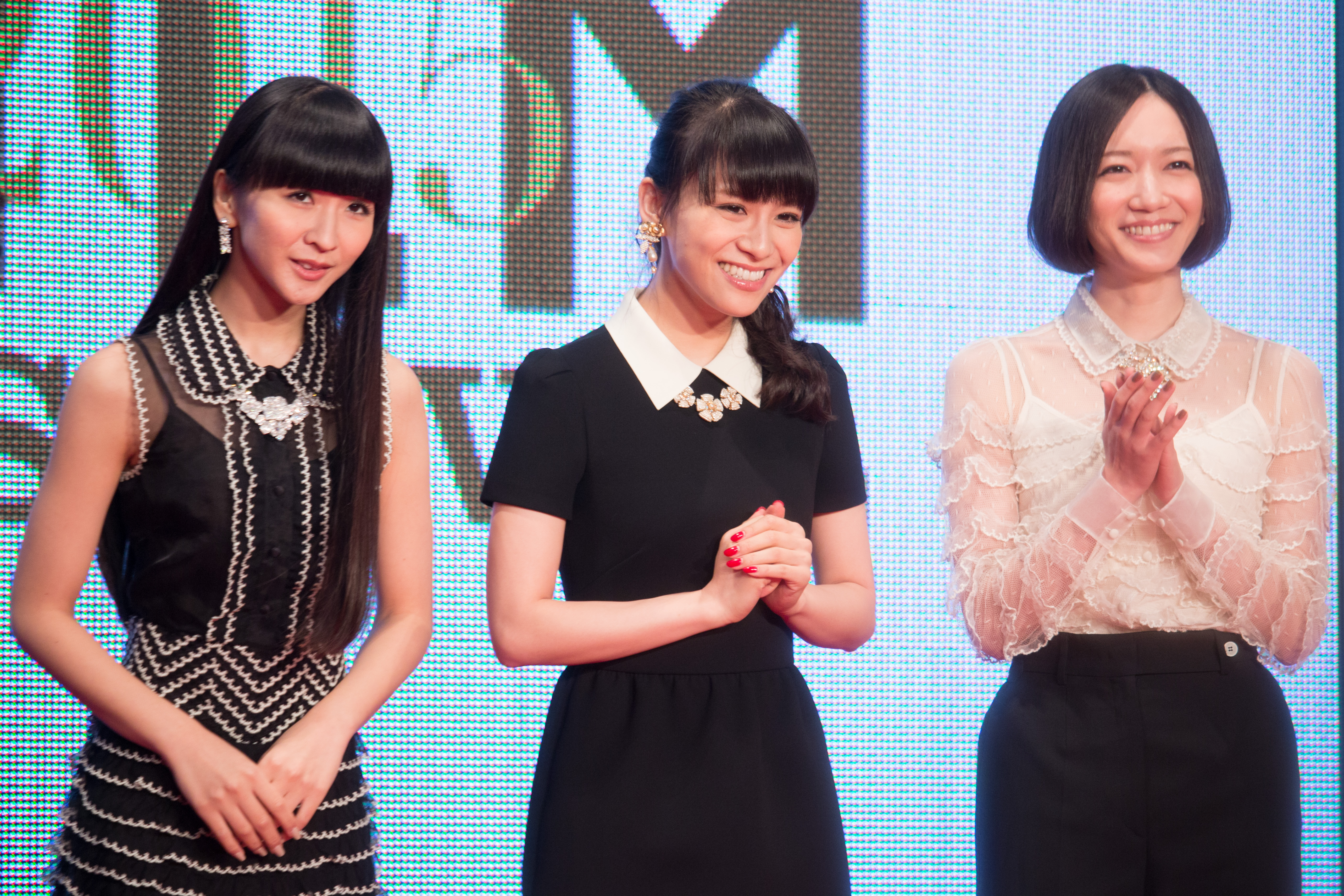 第28回 東京国際映画祭 オープニングセレモニー あ～ちゃん のっち かしゆか (Perfume) (We Are Perfume)